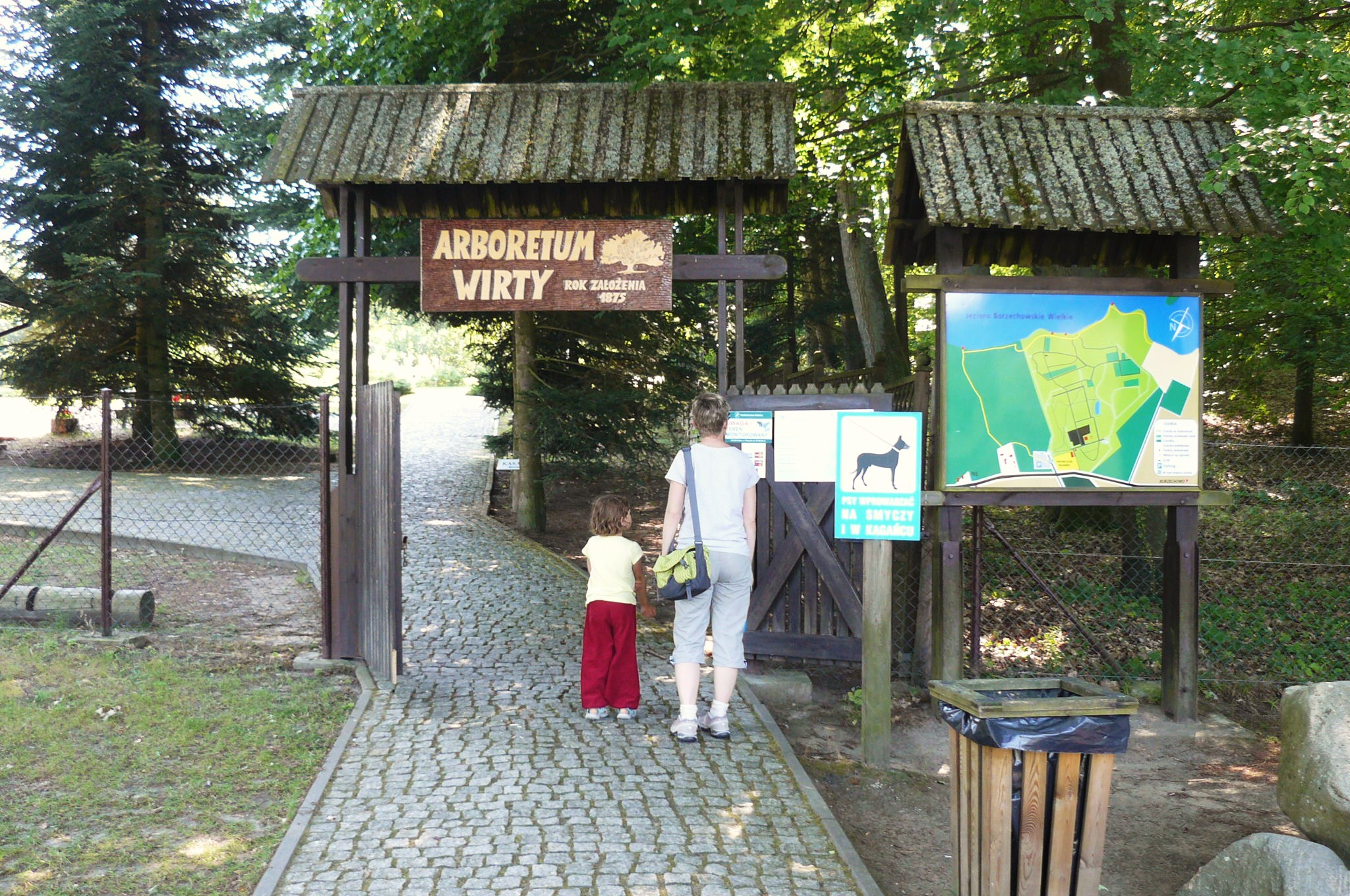 Wejście na teren Arboretum w Wiratch.